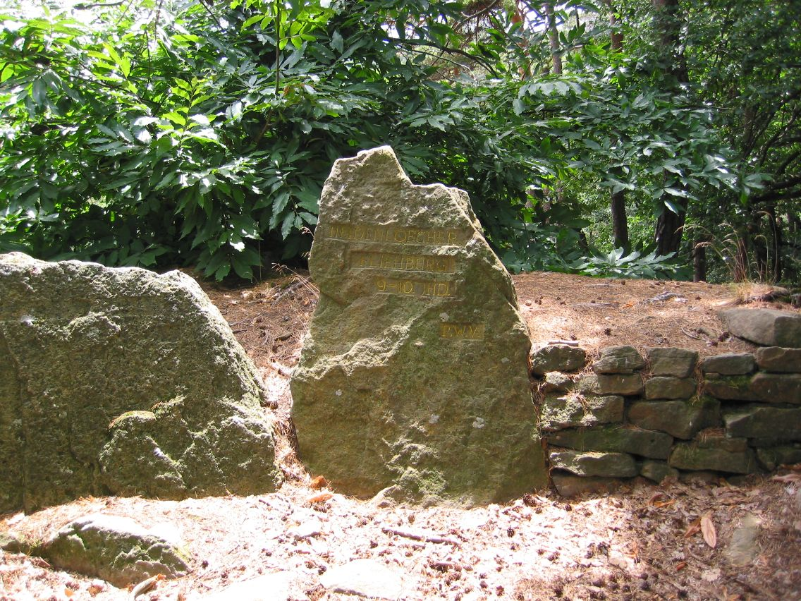 Ritterstein Nummer 260, Heidenlöcher - Fliehburg 9.-10. Jhd.